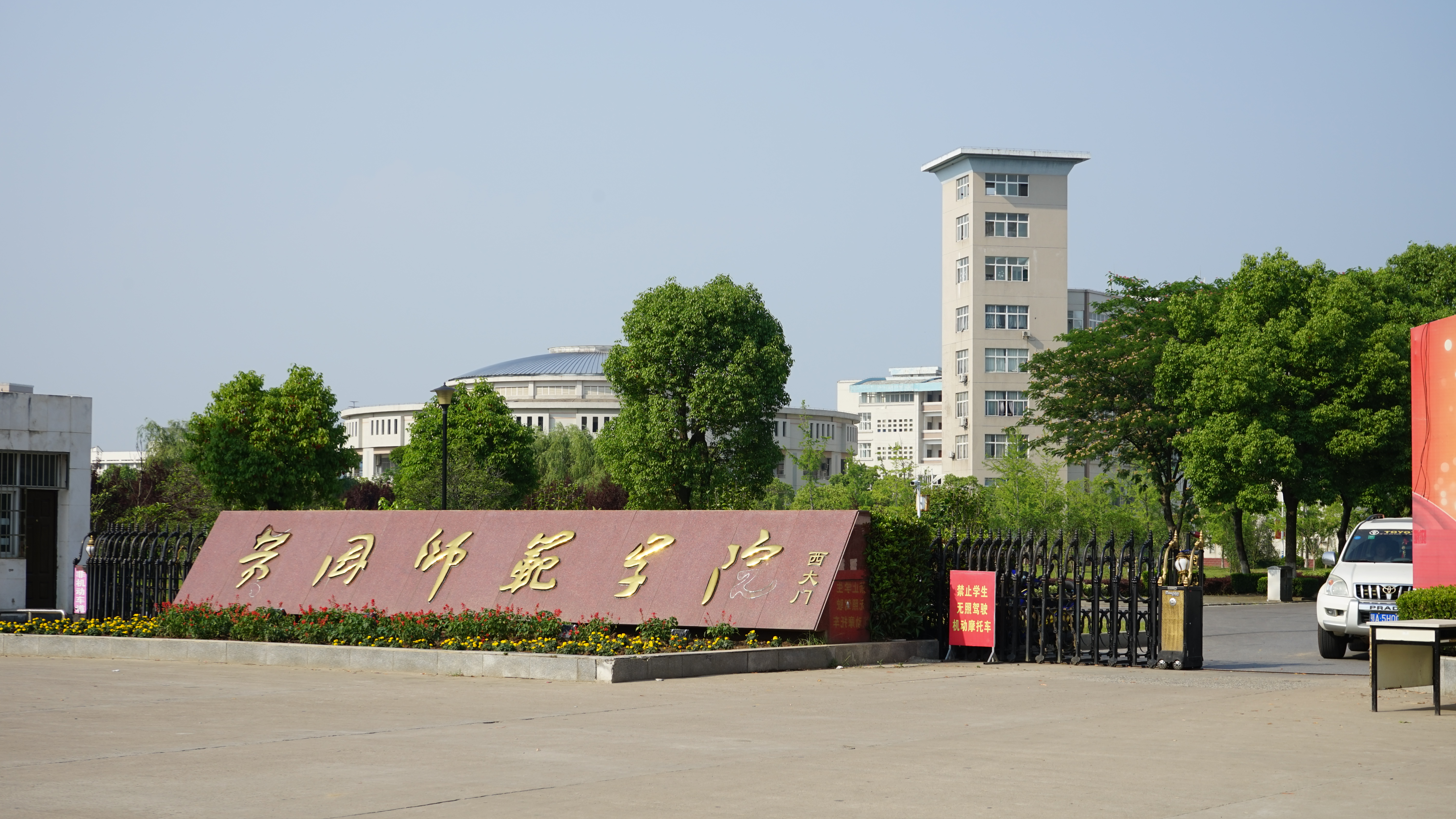 黄冈师范学院西门